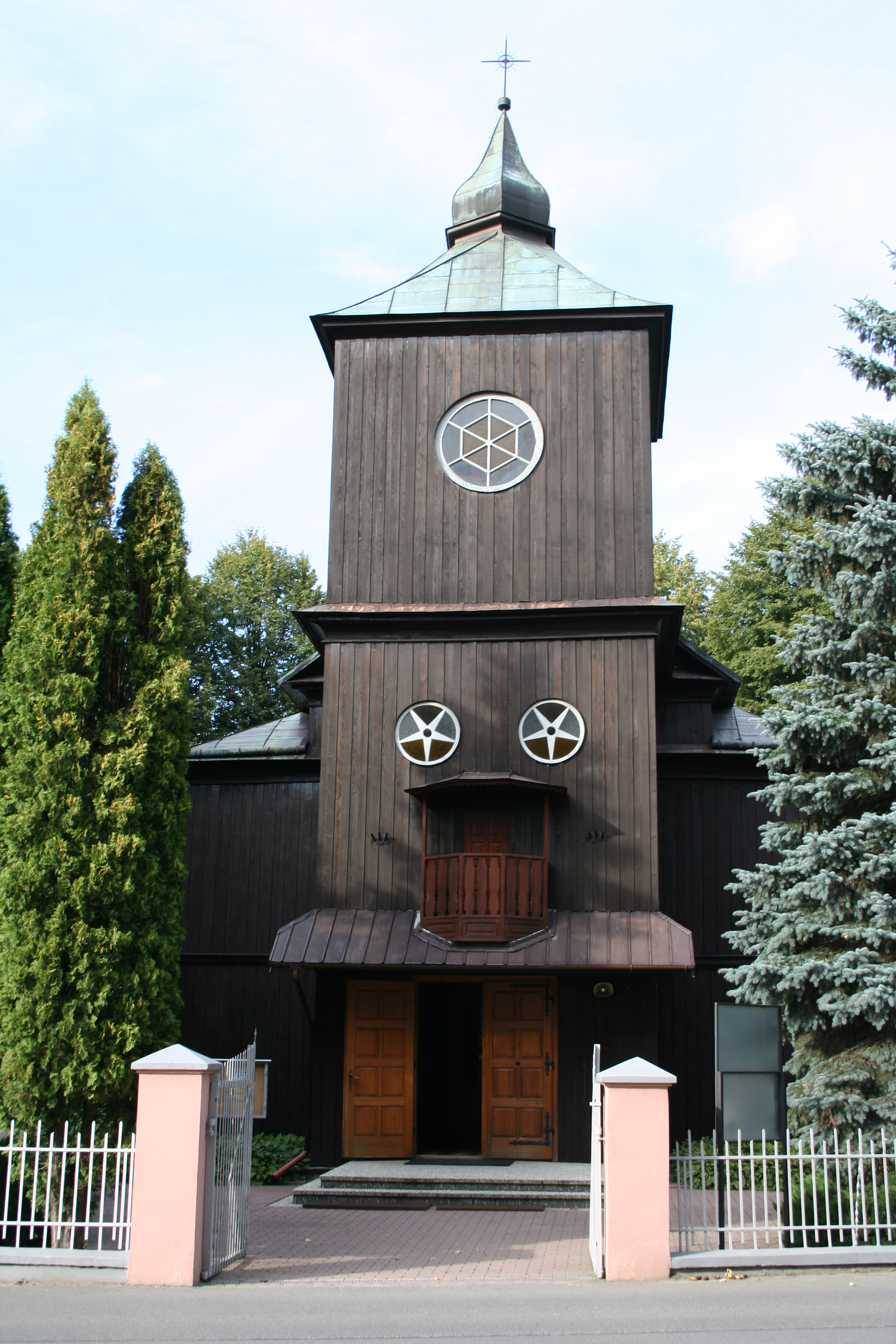 Straszydle, kościół par. p.w. Matki Boskiej Nieustającej Pomocy, 1739, 1929